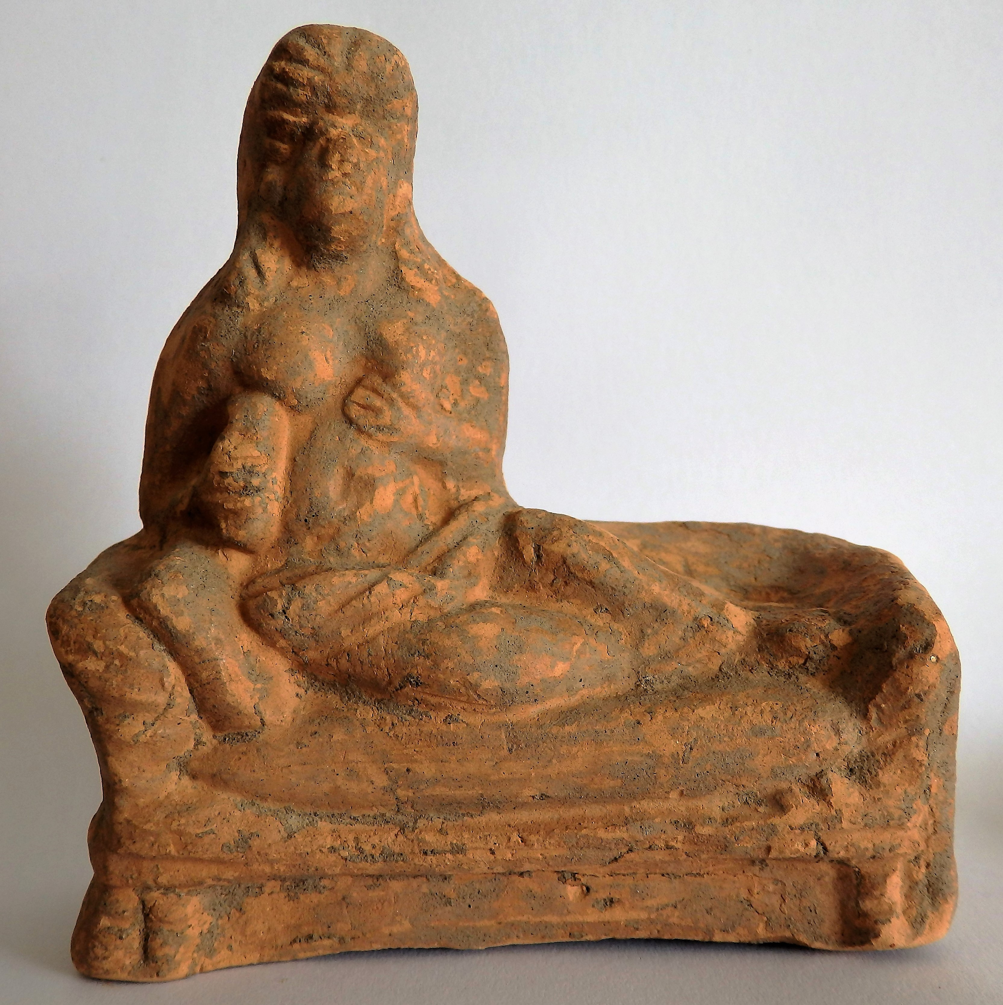 Kurtisane mit Alabastron in der rechten Hand, auf Kline, römisch, 2.-3. Jh. n. Chr., matritzengeformter Ton